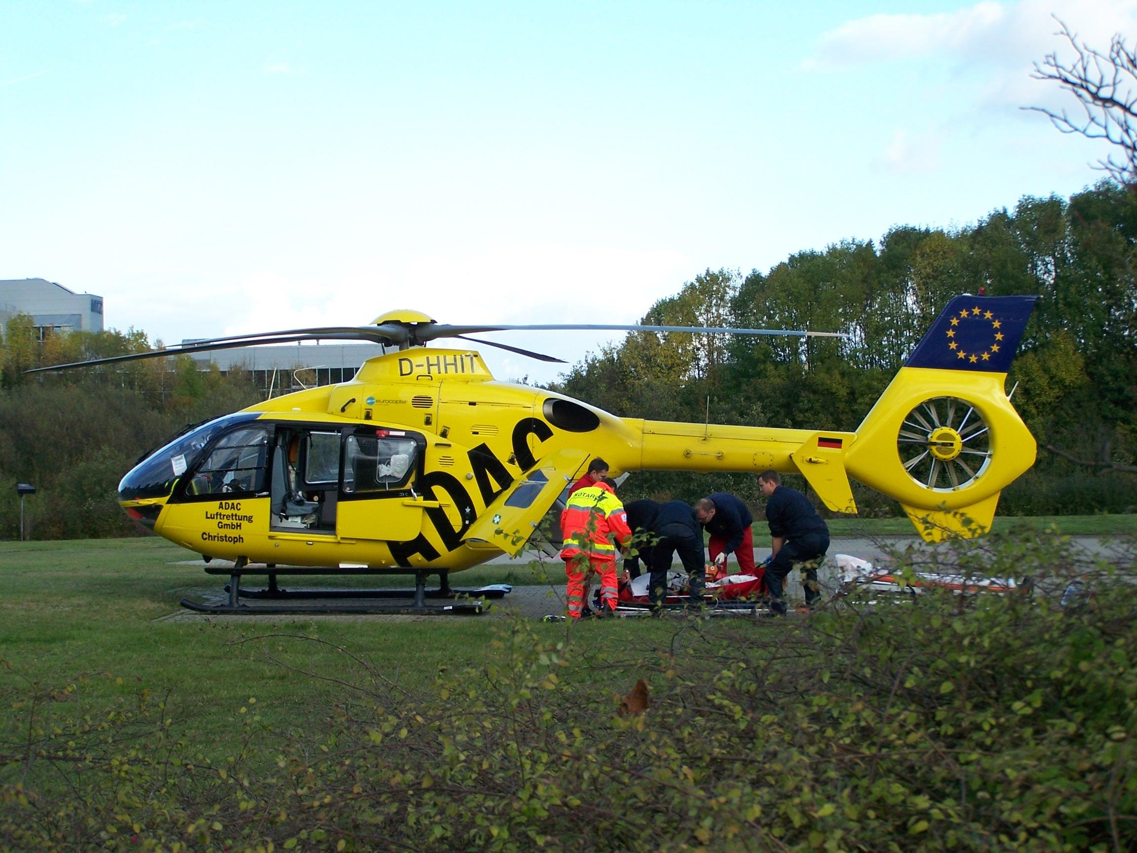 Rettungshubschrauber am Klinikum - rescue helicopter at the university hospital